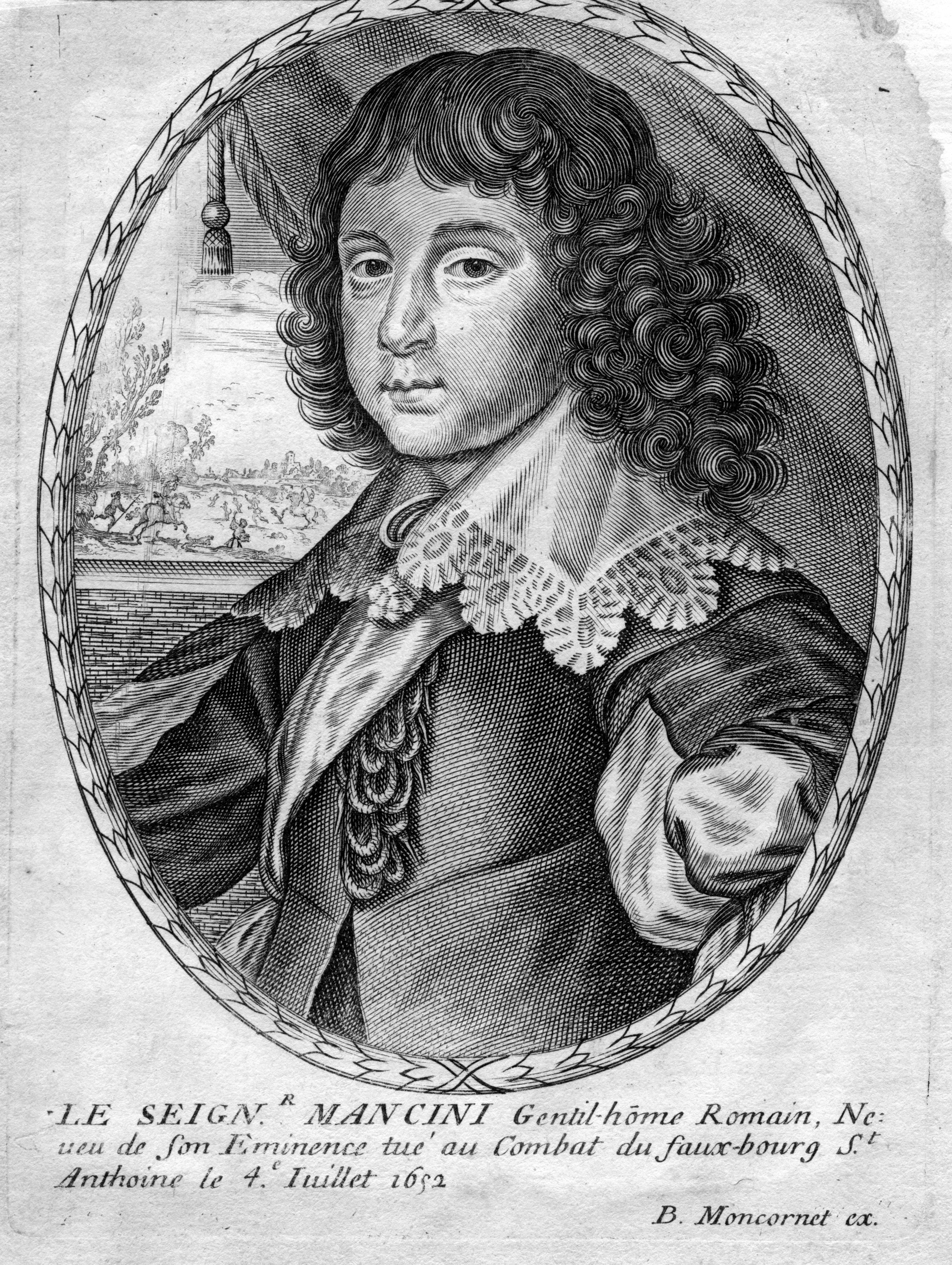 portrait gravé